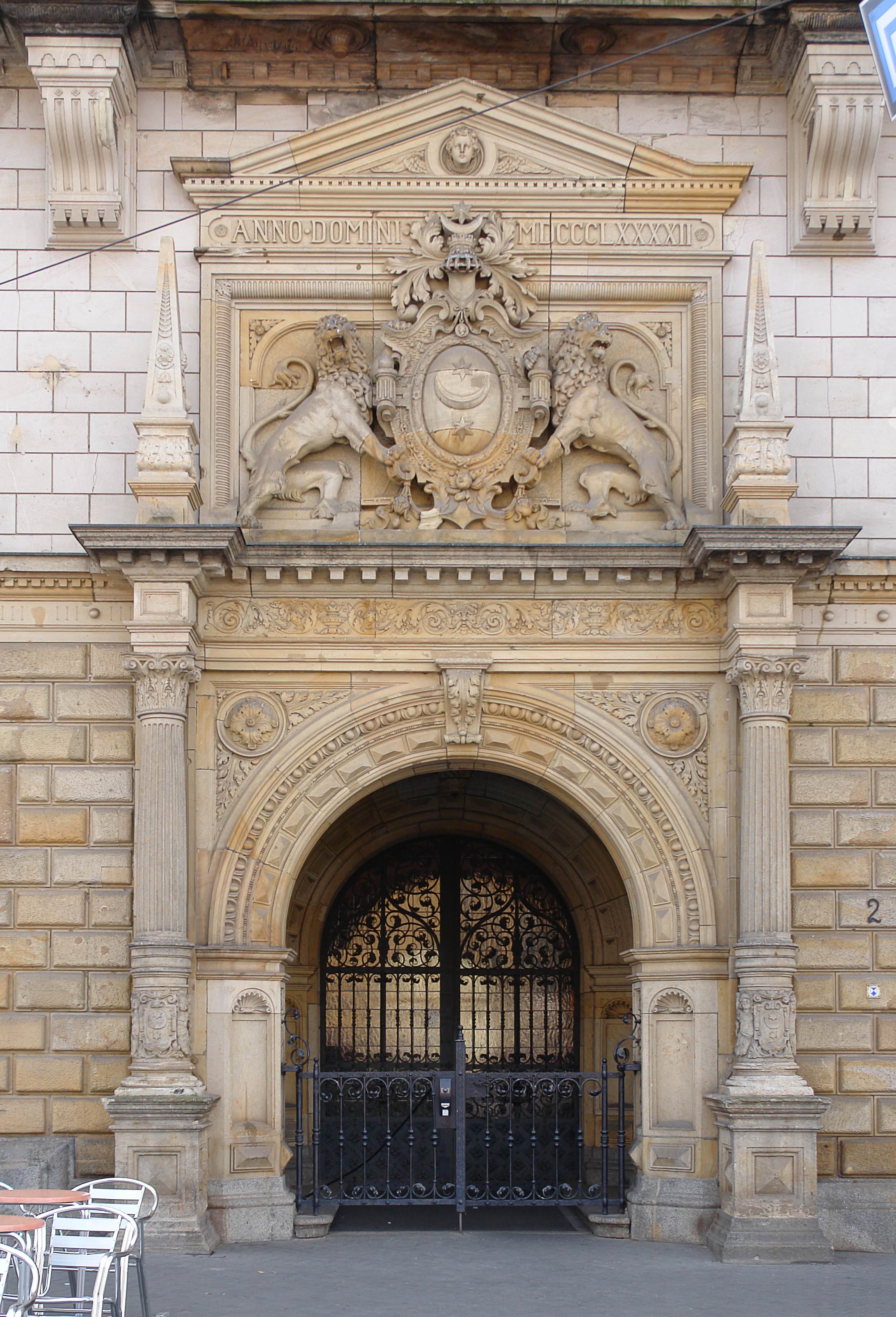 Eingangsportal des Stadthauses Halle (Saale) "Anno 1892"